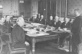 En avdelning av Högsta domstolen sammanträder för föredragning i Svärdsordens sal på Stockholms slott kring år 1900. Domstolen flyttade från sina lokaler på slottet till de nuvarande, i Bondeska palatset, i samband med 1948 års processreform, för att tillgodose det därav uppkomna behovet av förhandlingssalar. Se Ring (1898) s. 426 ff. och Lassen (1949) s. 777 ff. Sittande vid bordets högra sida (sett från betraktaren): Justitieråden Ernst Herslow, Karl Carlson, Herman Billing och Edvard Cassel Sittande vid bordets vänstra sida (sett från betraktaren): Justitieråden Wilhelm Huss, Theodor Wijkander och Johan Ramstedt Stående vid bordet: Protokollssekreteraren Peder Isberg Sittande vid föredragandens bord: Revisionssekreteraren Carl Lindhagen Ur Ramstedtska familjearkivet (förvaltat av f.d. lagmannen Carl Edvard Sturkell). Fotograf okänd. Källa